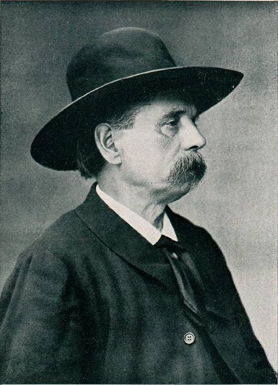 Jean-Baptiste Clément (1836-1903), chansonnier et communard français, photographié par Nadar (1820-1910)